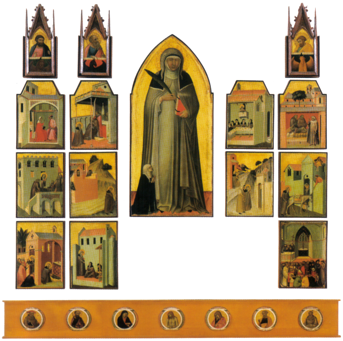 Pietro lorenzetti, pala della beata umiltà.jpg